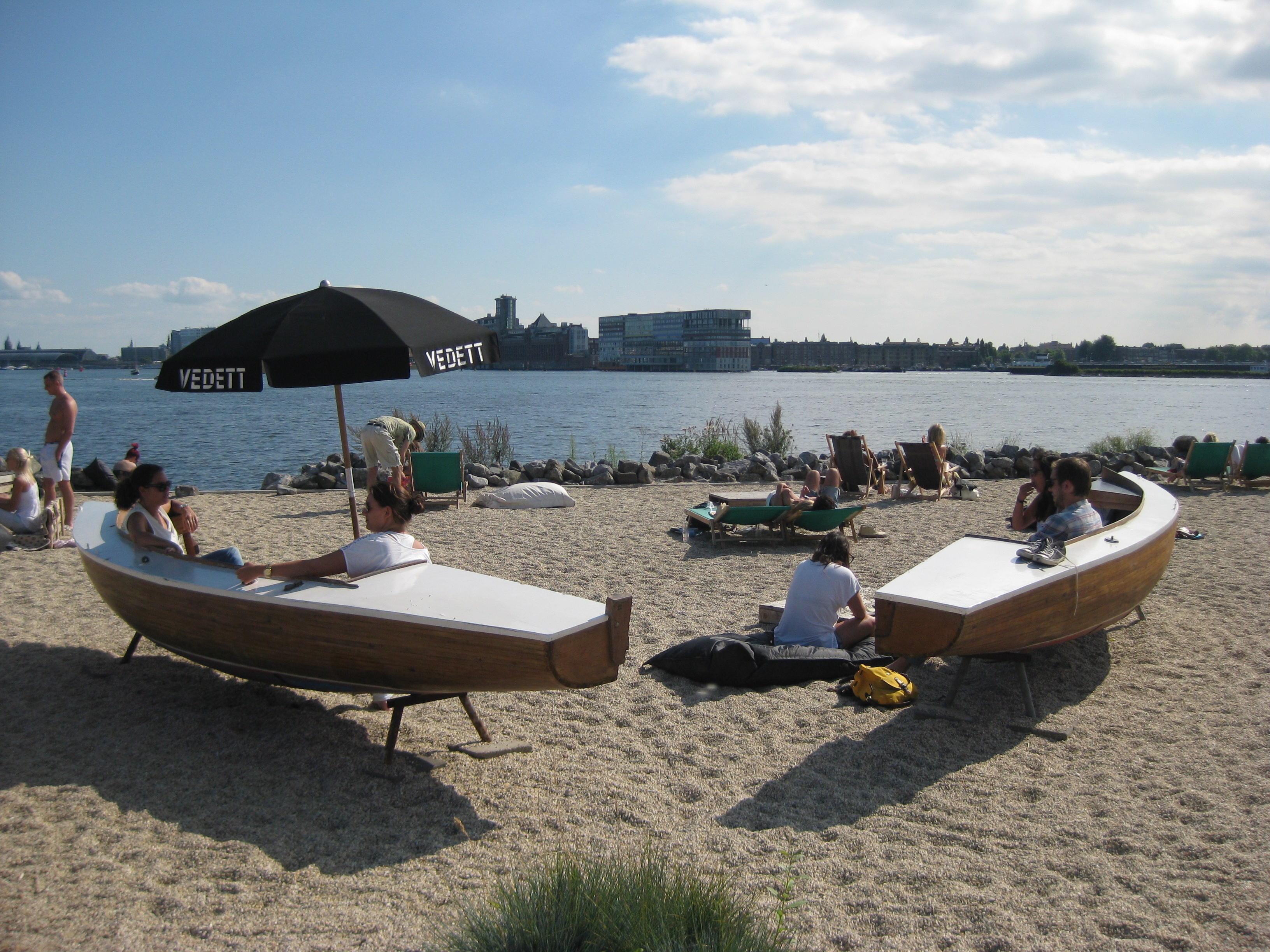 Stadsstrand Pllek in Amsterdam-Noord